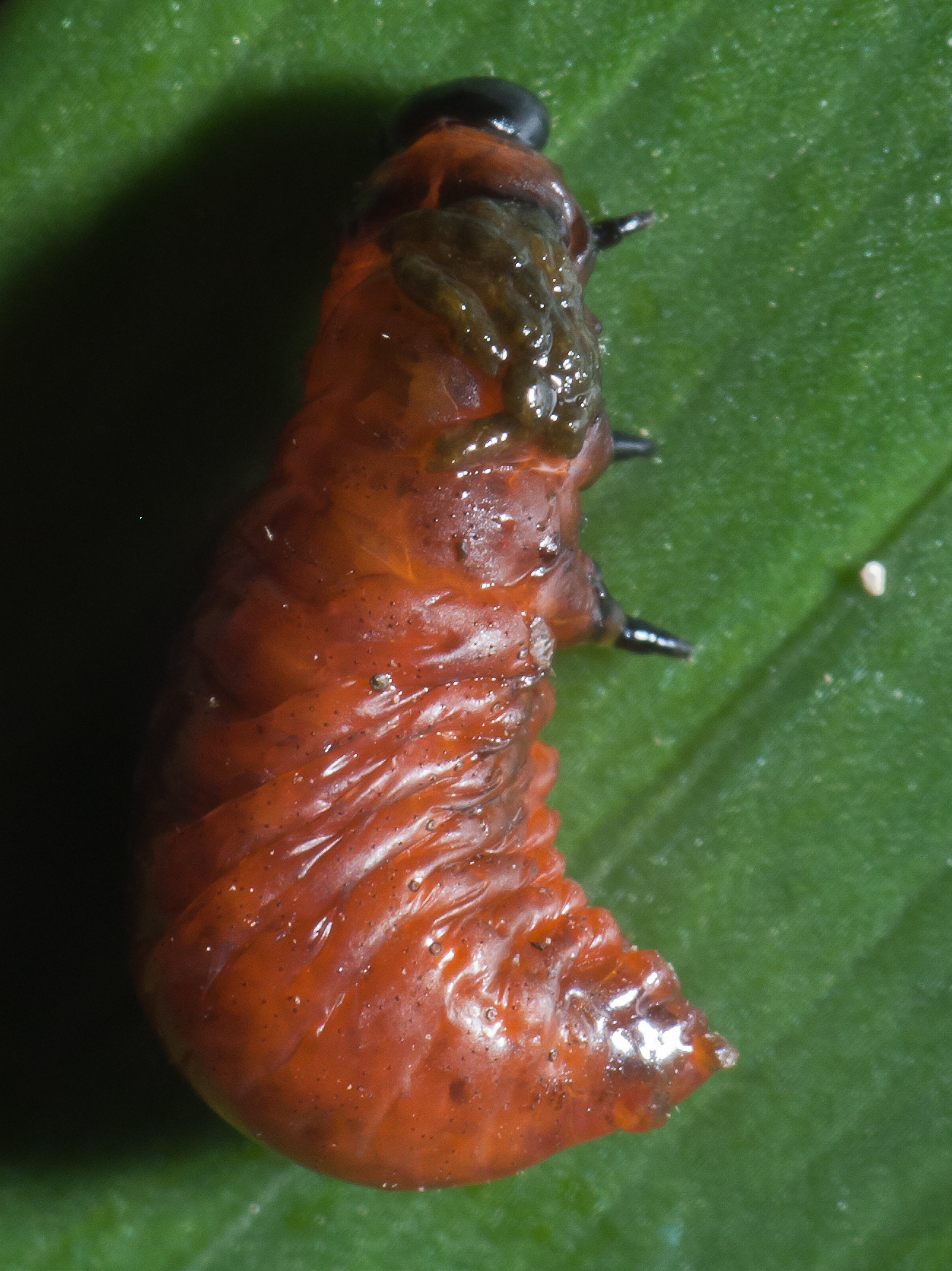 Larva, trala posta, de Lilioceris lilii. Soigrexa, Bastavales, Brión, Galiza